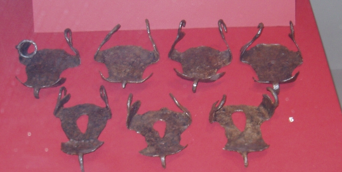 Fundort: Straubing, wahrscheinlich von syrischen Auxiliareinheit berittener Bogenschützen (dort stationiert)